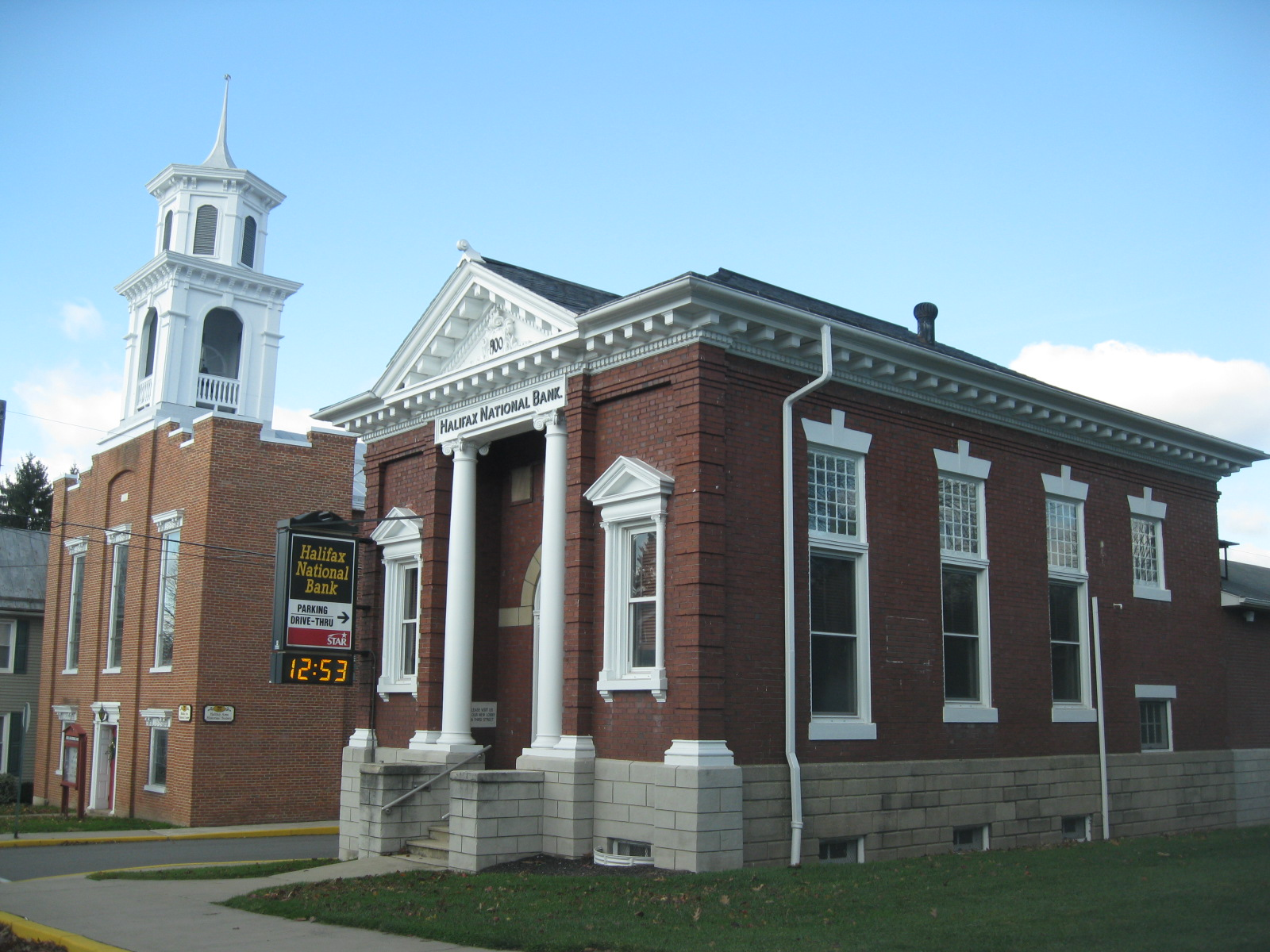 Halifax, Pennsylvania